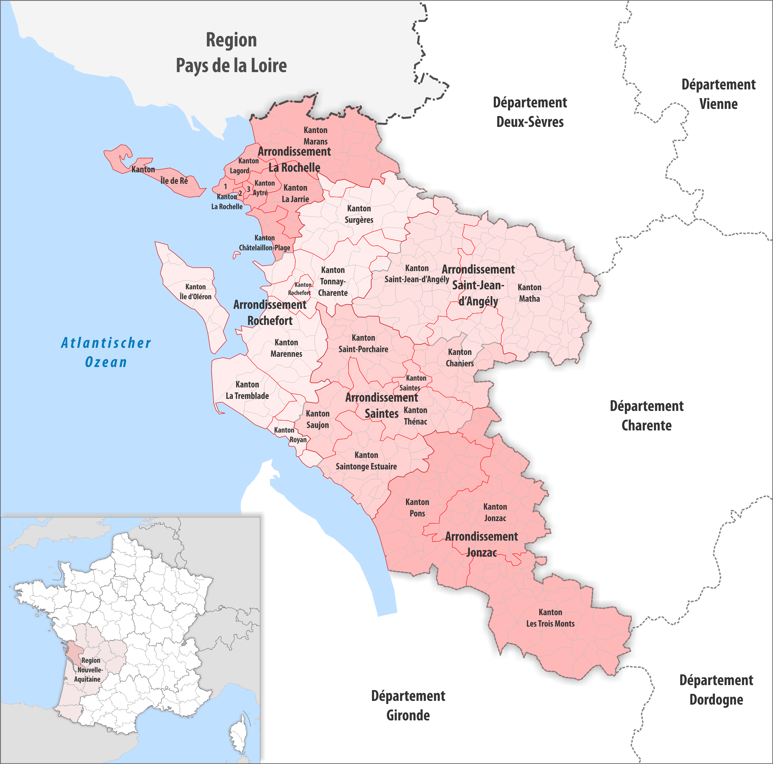 Gemeinden, Kantone und Arrondissemente im Departement Charente-Maritime